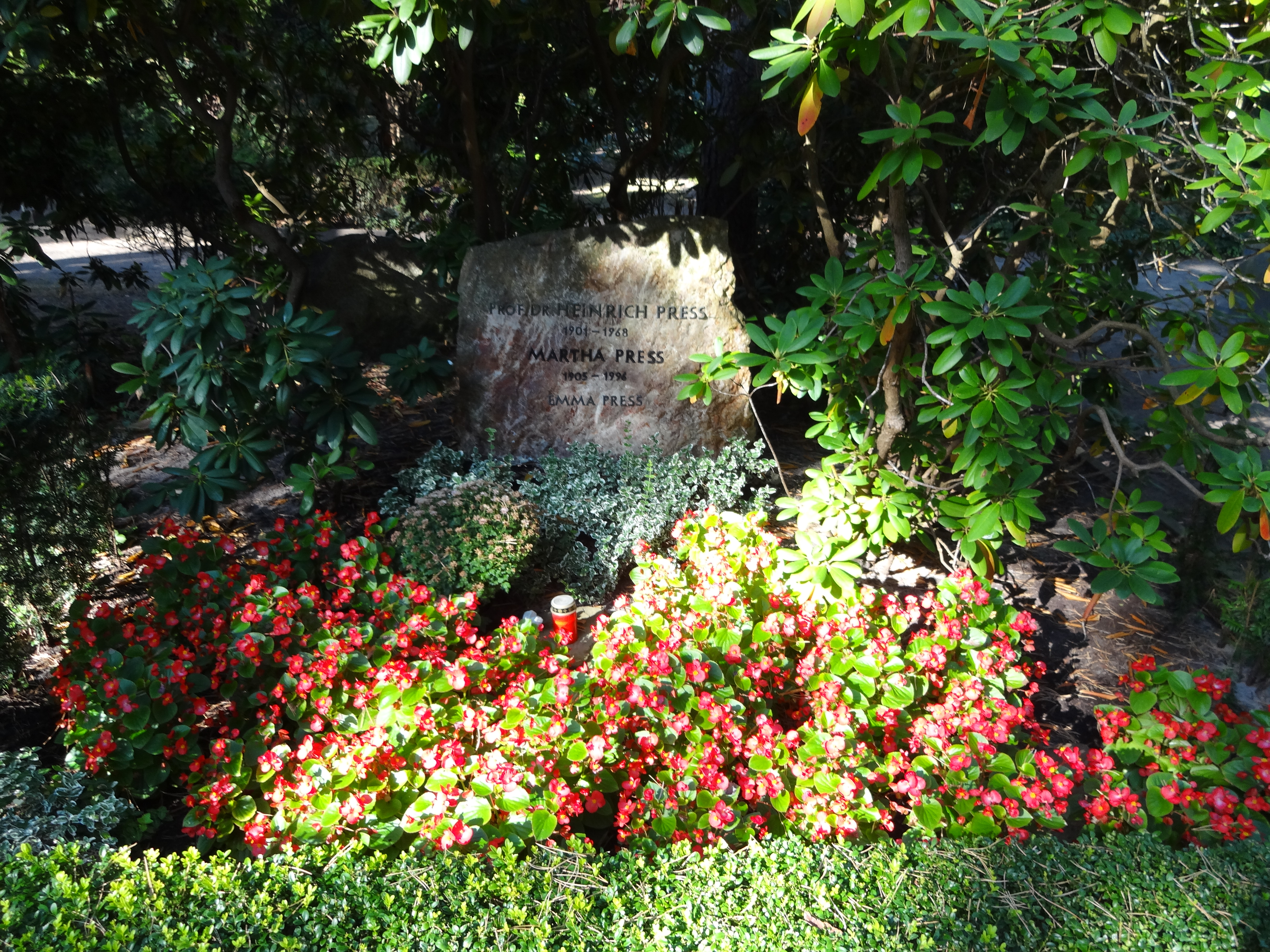 Grab von Prof. Heinrich Press auf dem Waldfriedhof Dahlem in Berlin